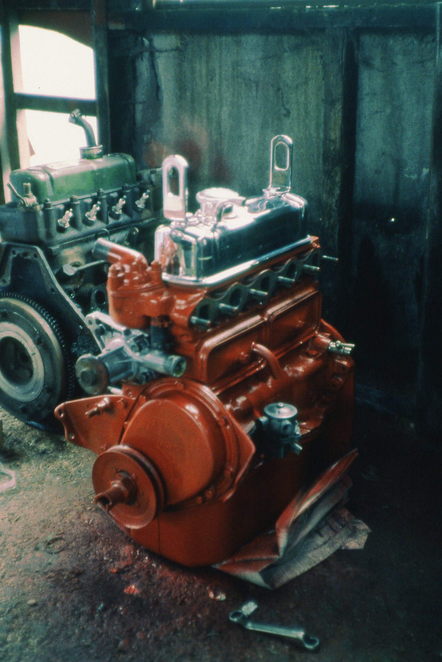 Scan from 35mm slide.